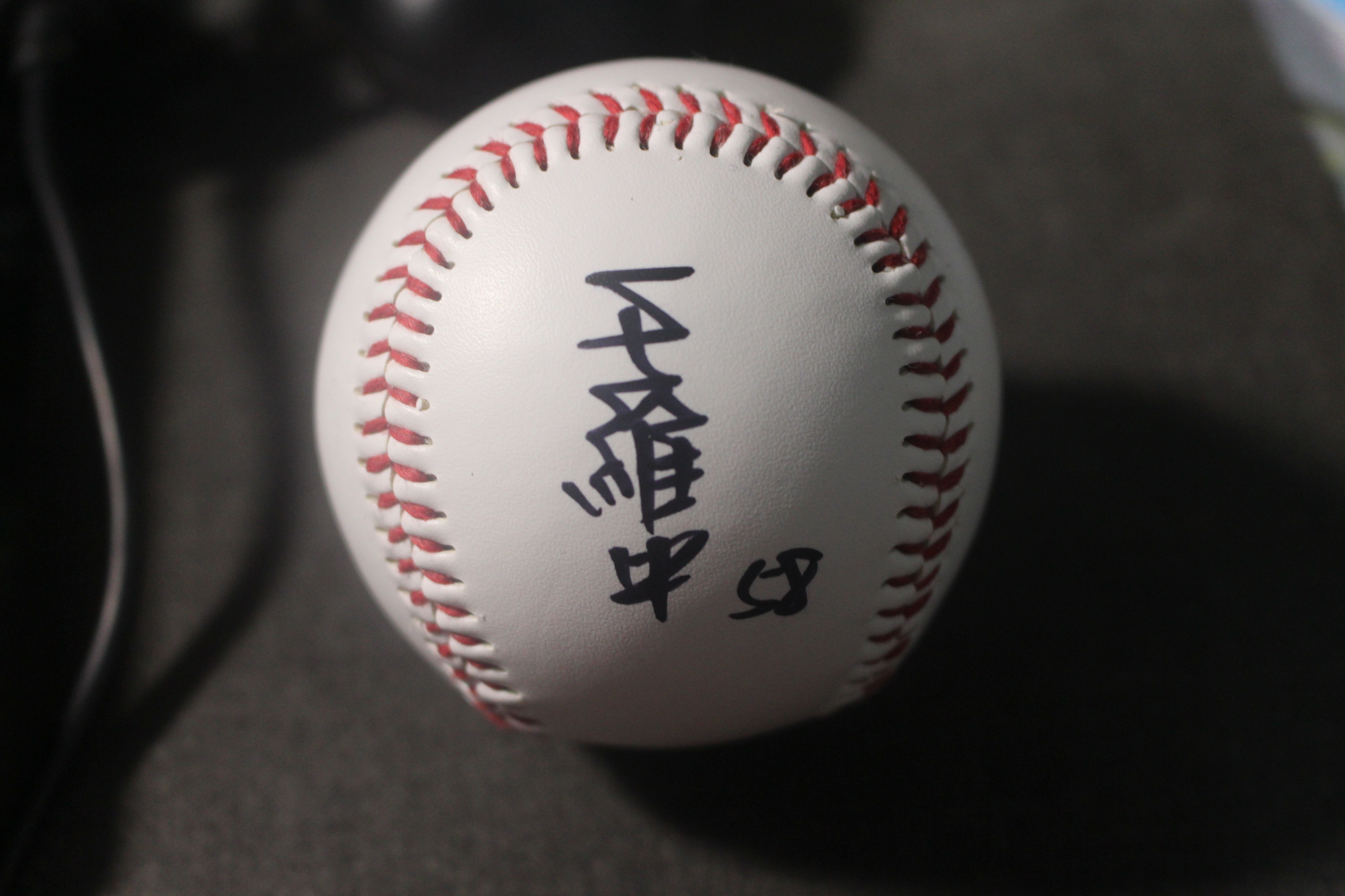 中文（台灣）: 臺灣棒球投手王維中簽名球。